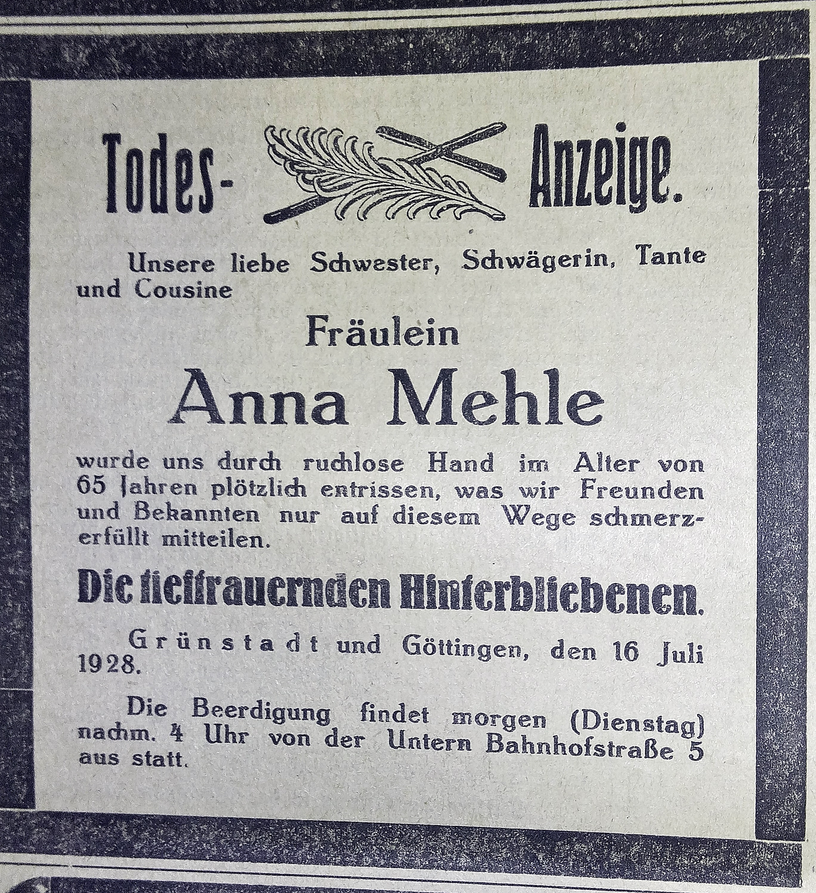 Todesanzeige der in Grünstadt ermordeten Anna Mehle, 1928. Eigenes Foto von alter Grünstadter Zeitung.